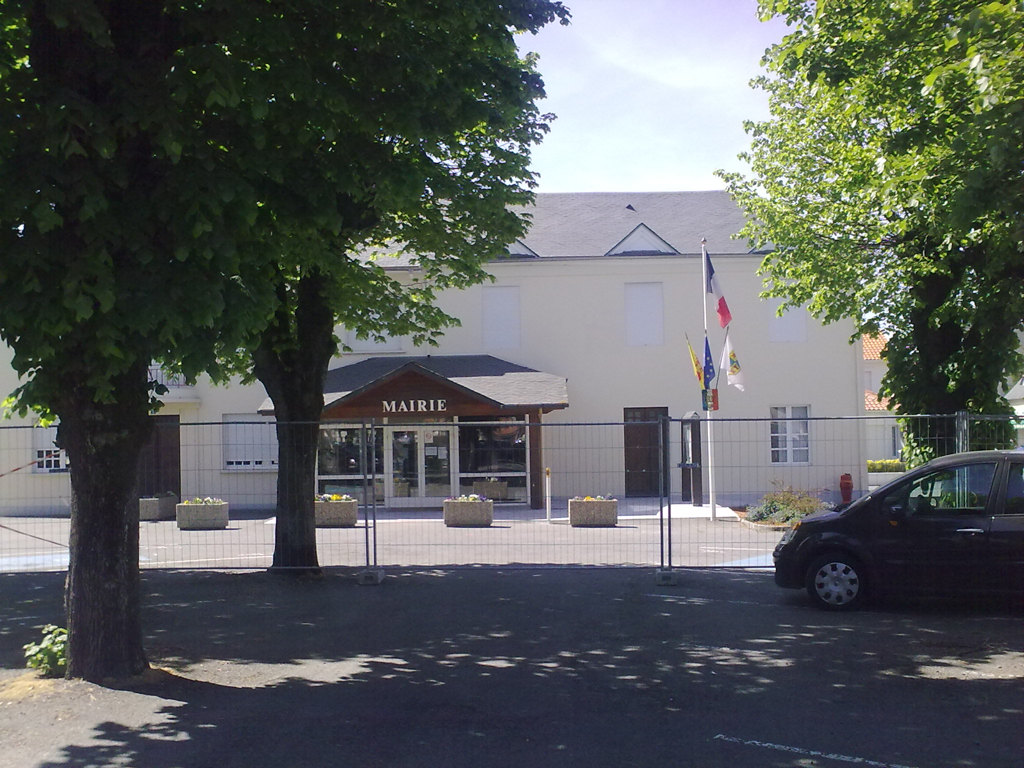 Soumoulou, France